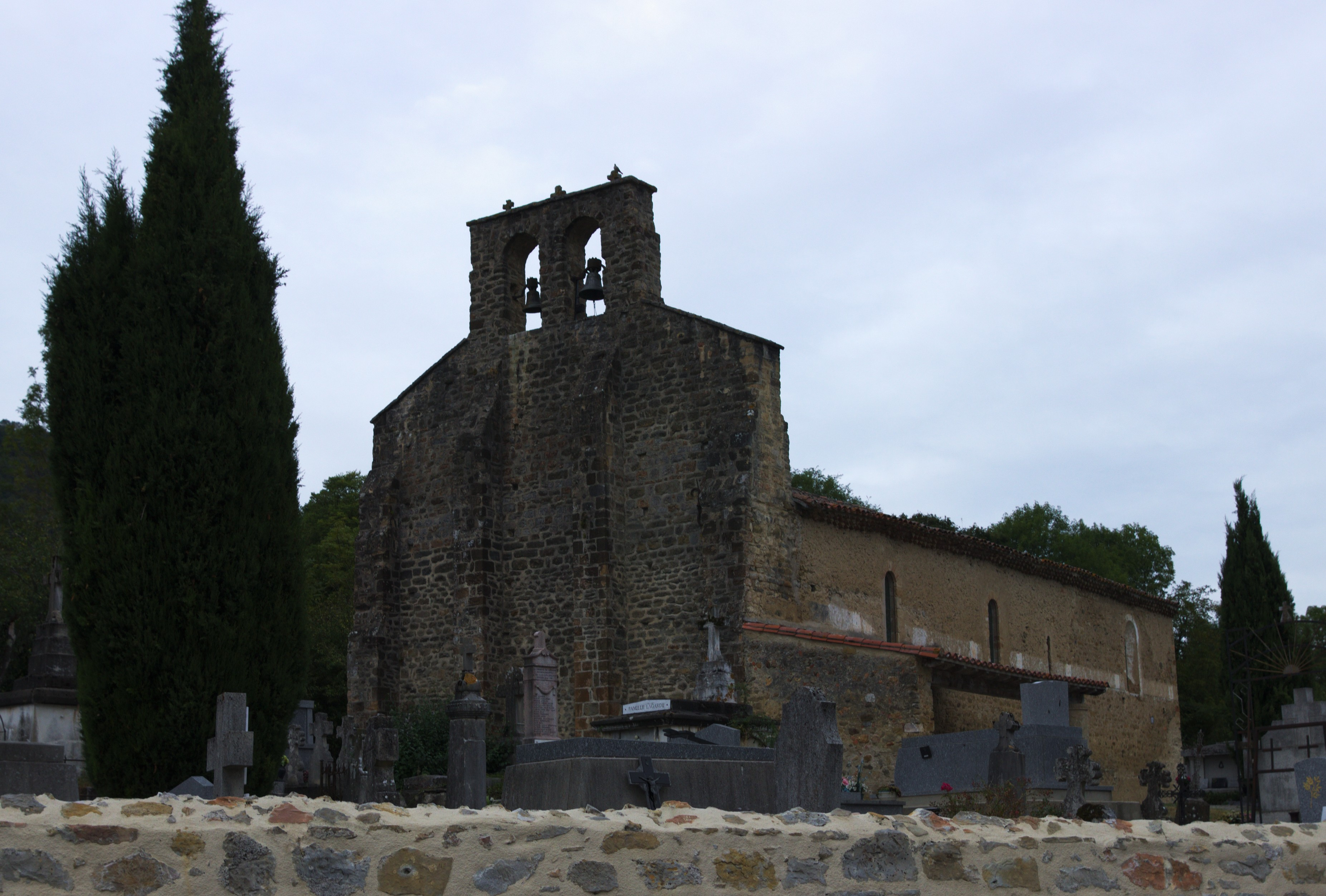 Église de la Sainte-Trinité de Loubens